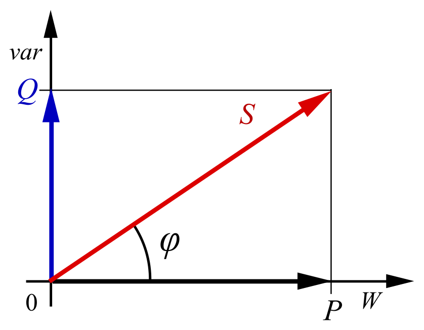 Aktive och reakti effekt